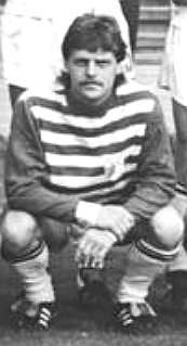 Title: Mannschaftsfoto FC Carl Zeiss Jena Factual corrections and alternative descriptions are encouraged separately from the original description. Additionally errors can be reported at this page to inform the Bundesarchiv. Original historic description: ADN-ZB-Kasper-16.9.83-zin-Bez. Gera: Die Mannschaft des FC Carl Zeiss Jena für die Fußball-Oberligasaison 1983-84. Vorn v.l.n.r. Matthias Pittelkow, Wolfgang Schilling, Robby Zimmermann, Konrad Weise, Andreas Krause, Gert Brauer und Thomas Töpfer. Mitte stehend v.l.n.r.: Trainer Hans Meyer, Jürgen Köberlein, STefan Meixner, Torhüter Karsten Härtel, Torhüter Hans-Ullrich Grapenthin, Torhüter Perry Bräutigam, Heiko Peschke, Martin Trocha und Trainer Helmut Stein. Hinten stehend v.l.n.r.: Thomas Ludwig, Jürgen Raab, Andreas Bielau, Gerhard Hoppe, Mannschaftskapitän Rüdiger Schnuphase und Jörg Burow. Die Jenaer Elf erreichte im Hinspiel der 1. Runde des Fußball-UEFA-Pokals am 13.9.83 bei IB Veastmannayejar in Reykjavik ein 0:0 und empfängt die Isländer am 28.9.83 zum Rückspiel im heimischen Ernst-Abbe-Sportfeld.